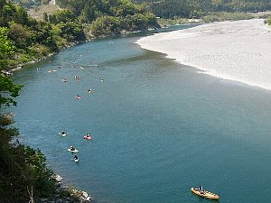 niyodogawa Falls in kouthi,Japan